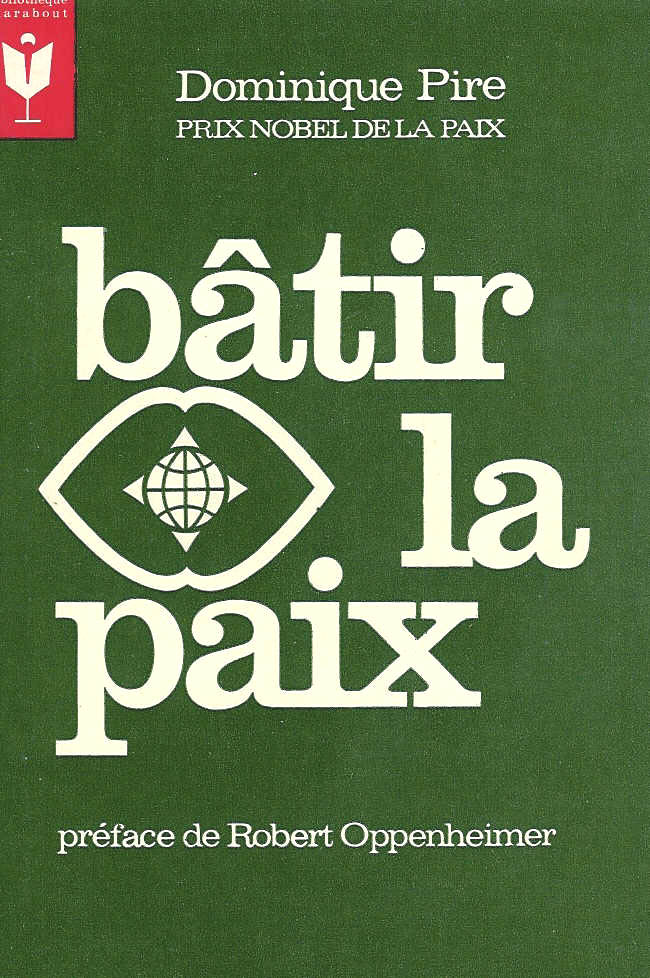 Pire.